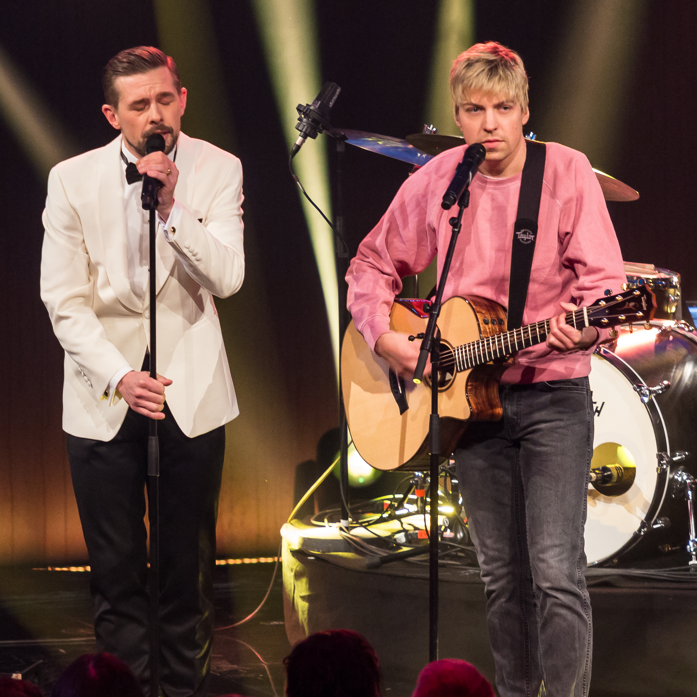 1LIVE Krone 2016 - 2015 - Show - Klaas Heufer-Umlauf und Philipp Poisel